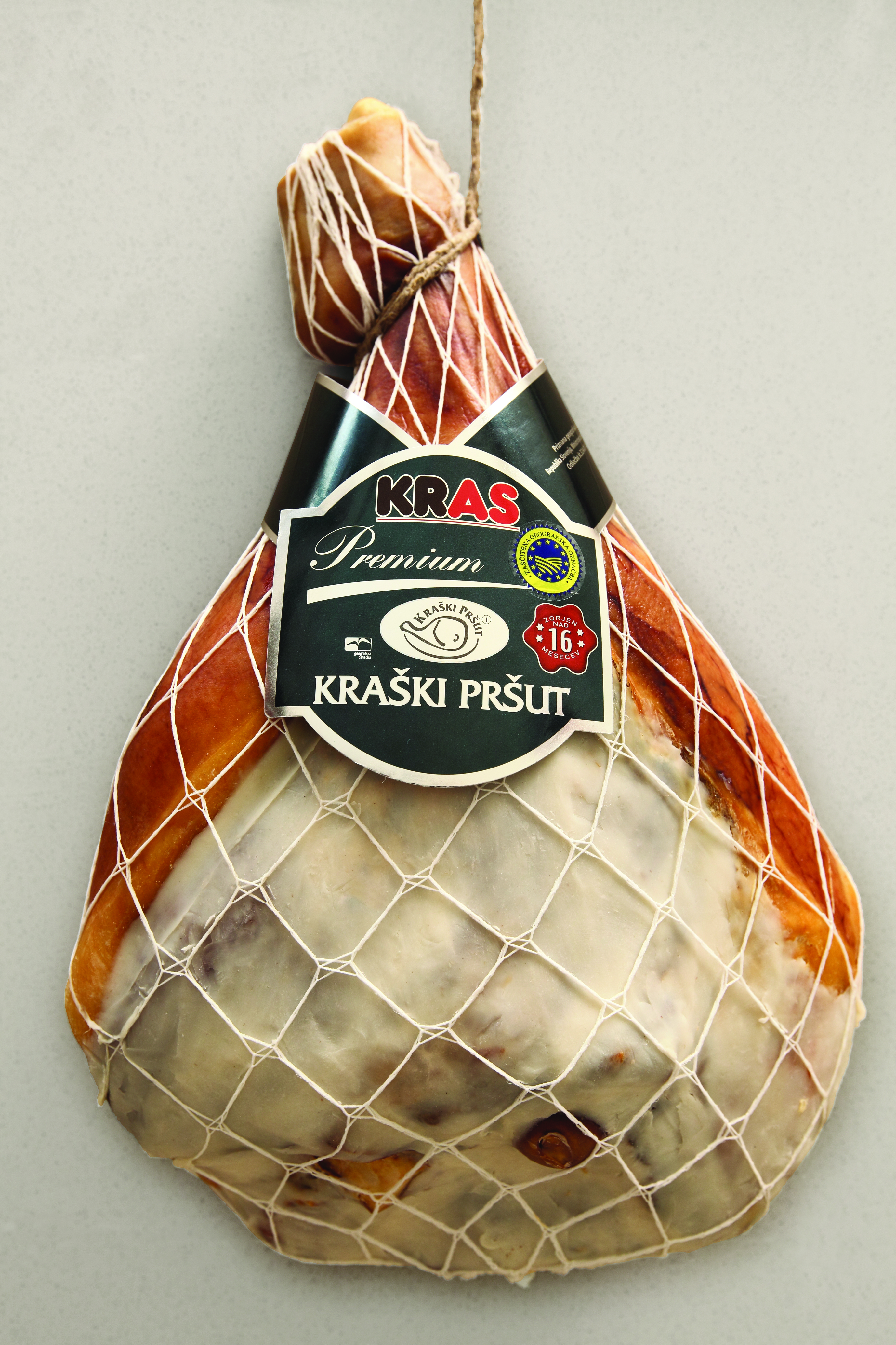 Kraški pršut 16 mesecev